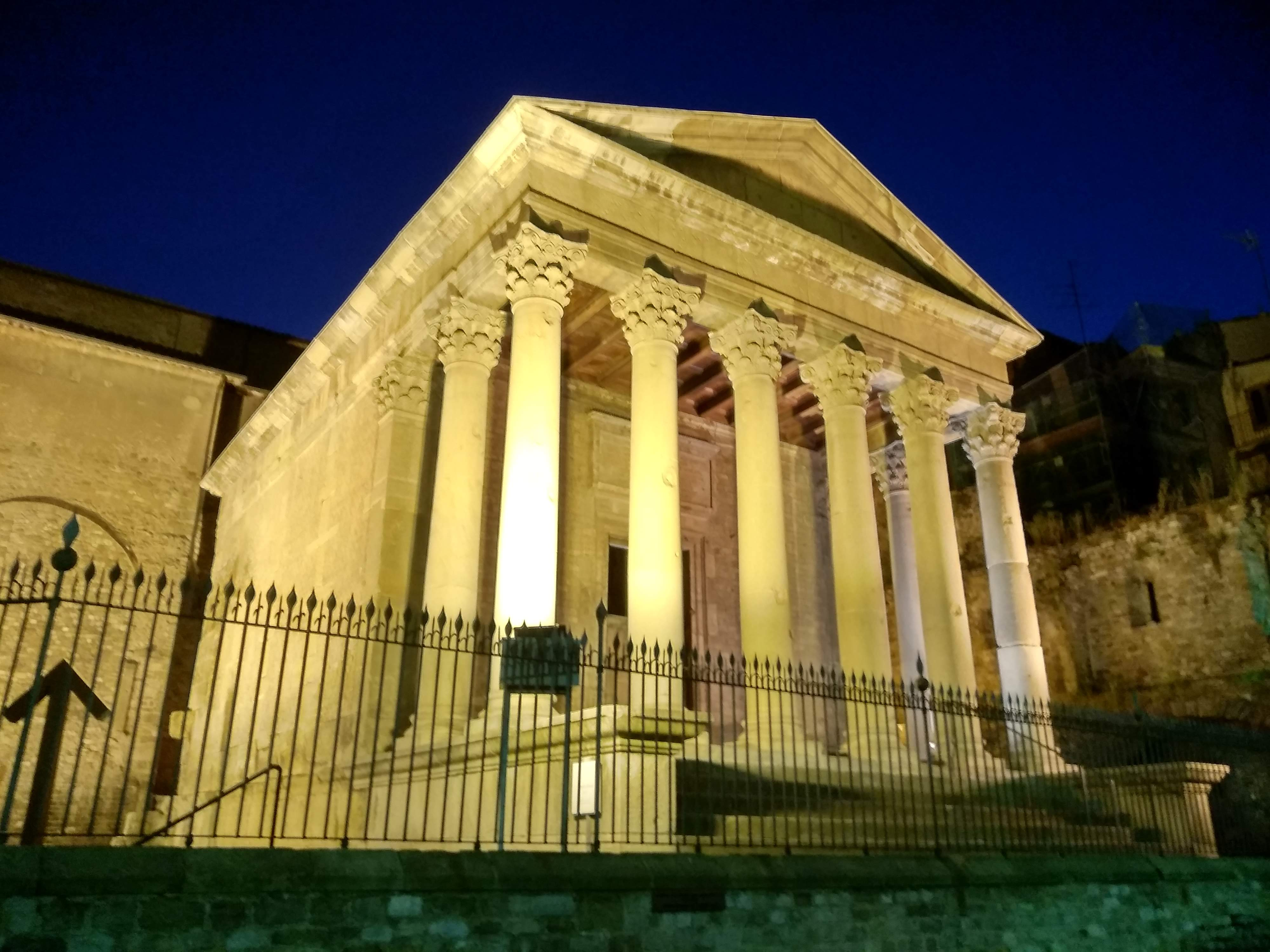 Templo romano situado en el centro histórico de la ciudad de Vic.